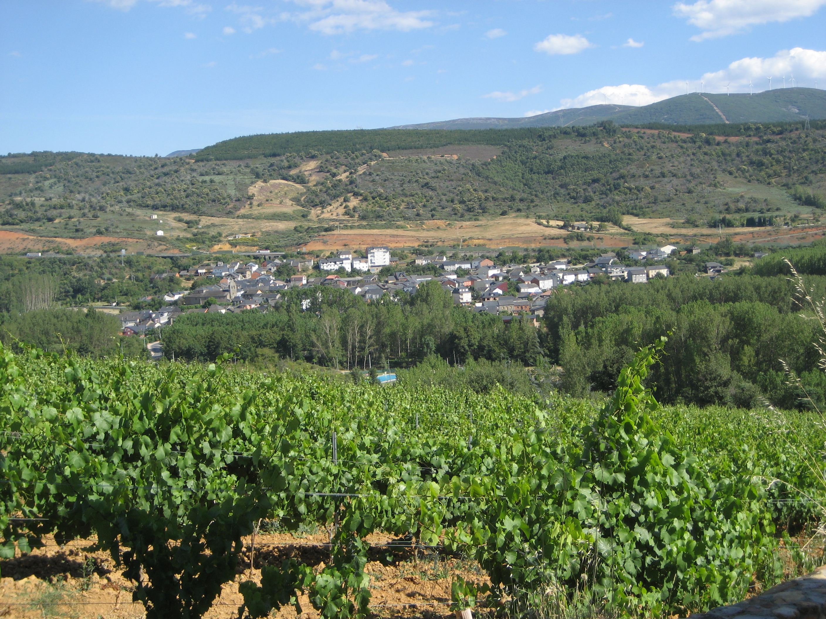 Vista panorámica de Albares de la Ribera